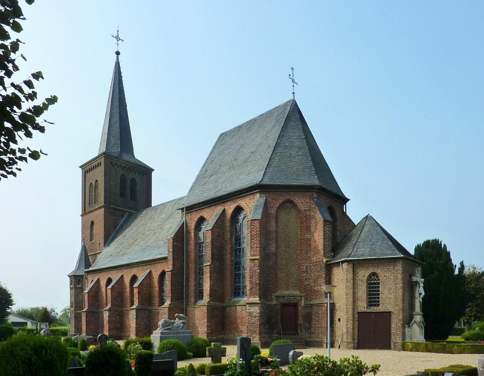 Kath. Kirche St. Martin, Mehr